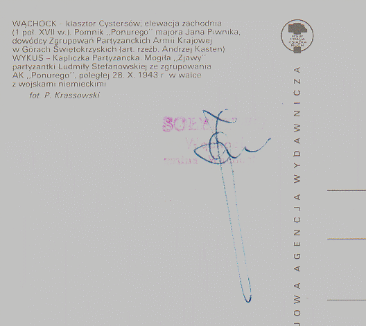 Pieczęć i podpis sołtysa na pocztówce Wąchocka. 1988 lub 1989 rok.